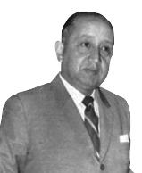 imagen de bn